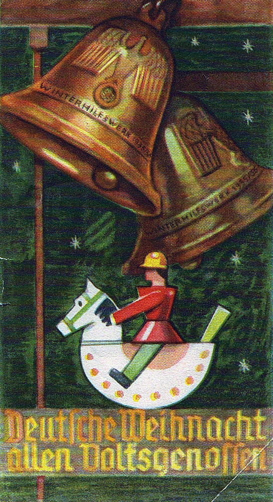 Türplakette des WHW 1935 als Spendenbescheinigung